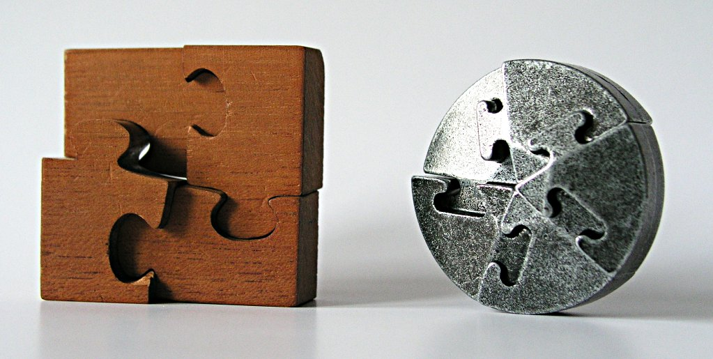 Beispiel für Auseinander-nehm-Puzzle